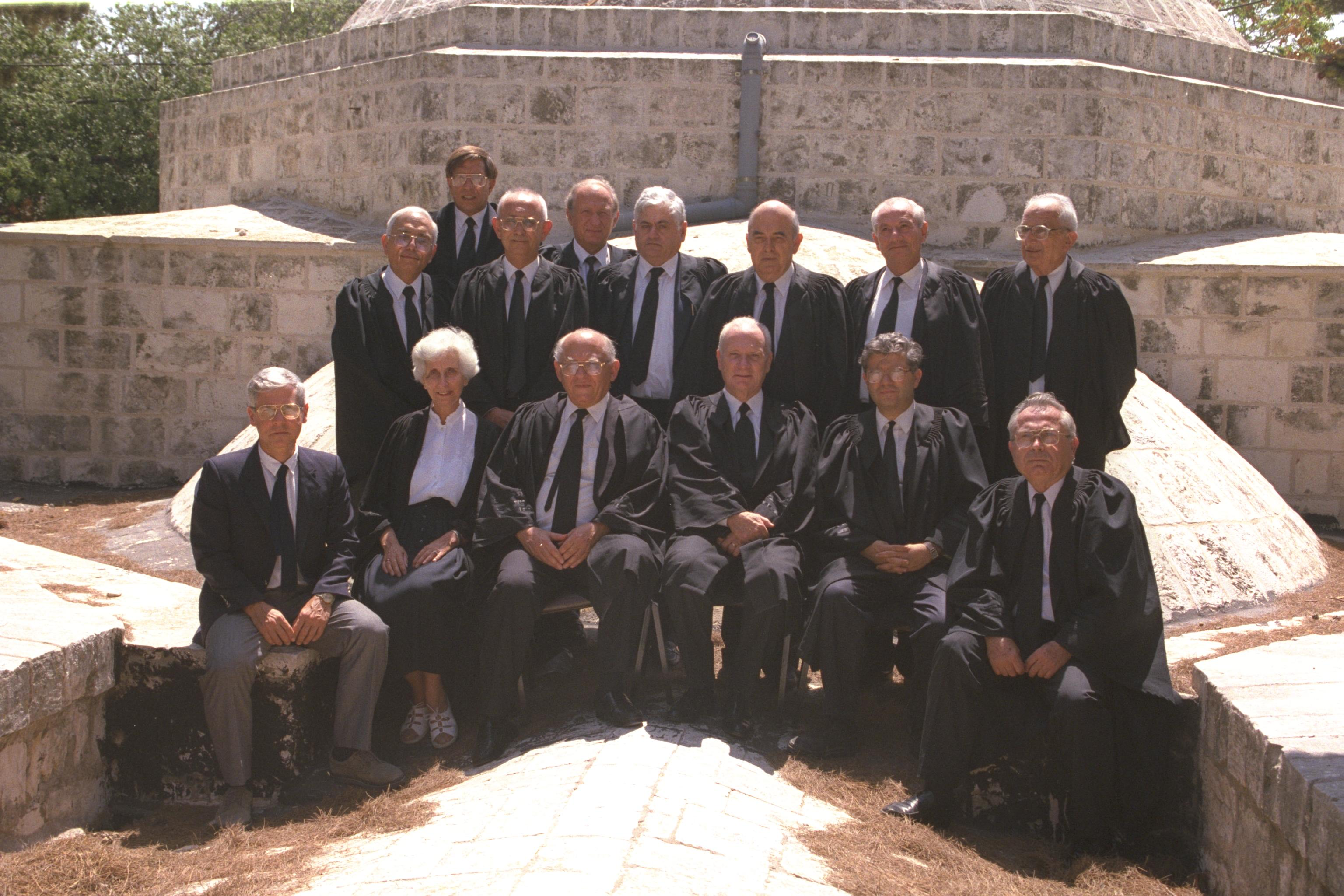 Supreme Court Justices on the roof of the old supreme court building in the Russian compound in Jerusalem. שופטי בית המשפט העליון על גג בית המשפט העליון הישן במגרש הרוסים בירושלים. מימין לשמאל. עומדים: דב לוין, גבריאל בך, יעקב מלץ(?), שלמה לוין, מישאל חשין, אליעזר גולדברג, _, אליהו מצא(?). יושבים: תיאודור אור, אהרון ברק, מאיר שמגר, מנחם אלון, שושנה נתניהו, _ Photo: KOREN ZIV, 08/31/1992